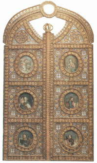 Царскiя вароты - фрагмент царкоунага iканастаса, саломапляценне, канец XVIII ст.Institution:Grodno State Historical and Archaeological Museum